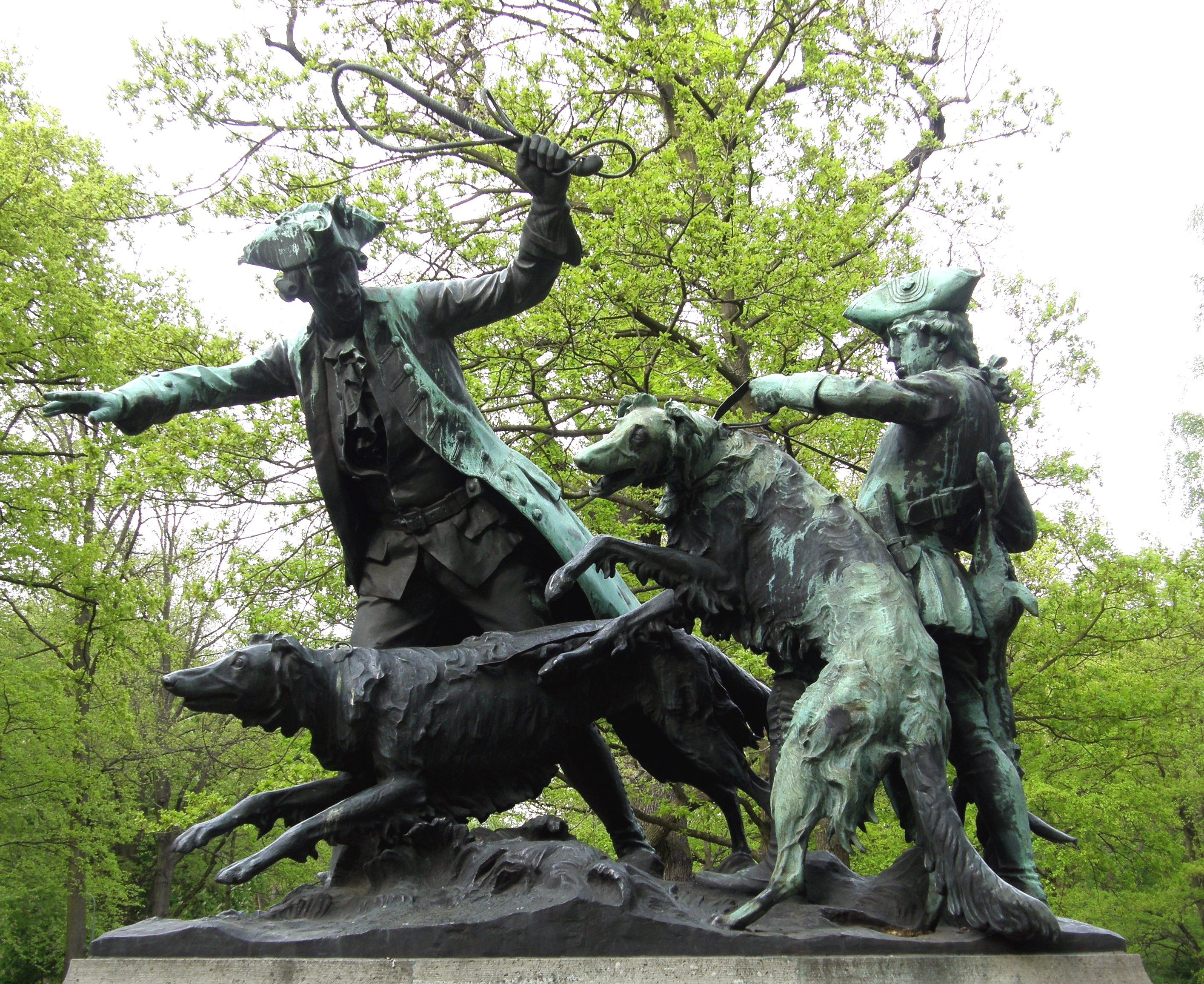 Skulptur Hasenhatz der Rokokozeit von Max Baumbach, geschaffen 1903-04. Die Plastik gehört zu einem Ensemble von vier Skulpturen mit Jagdszenen.